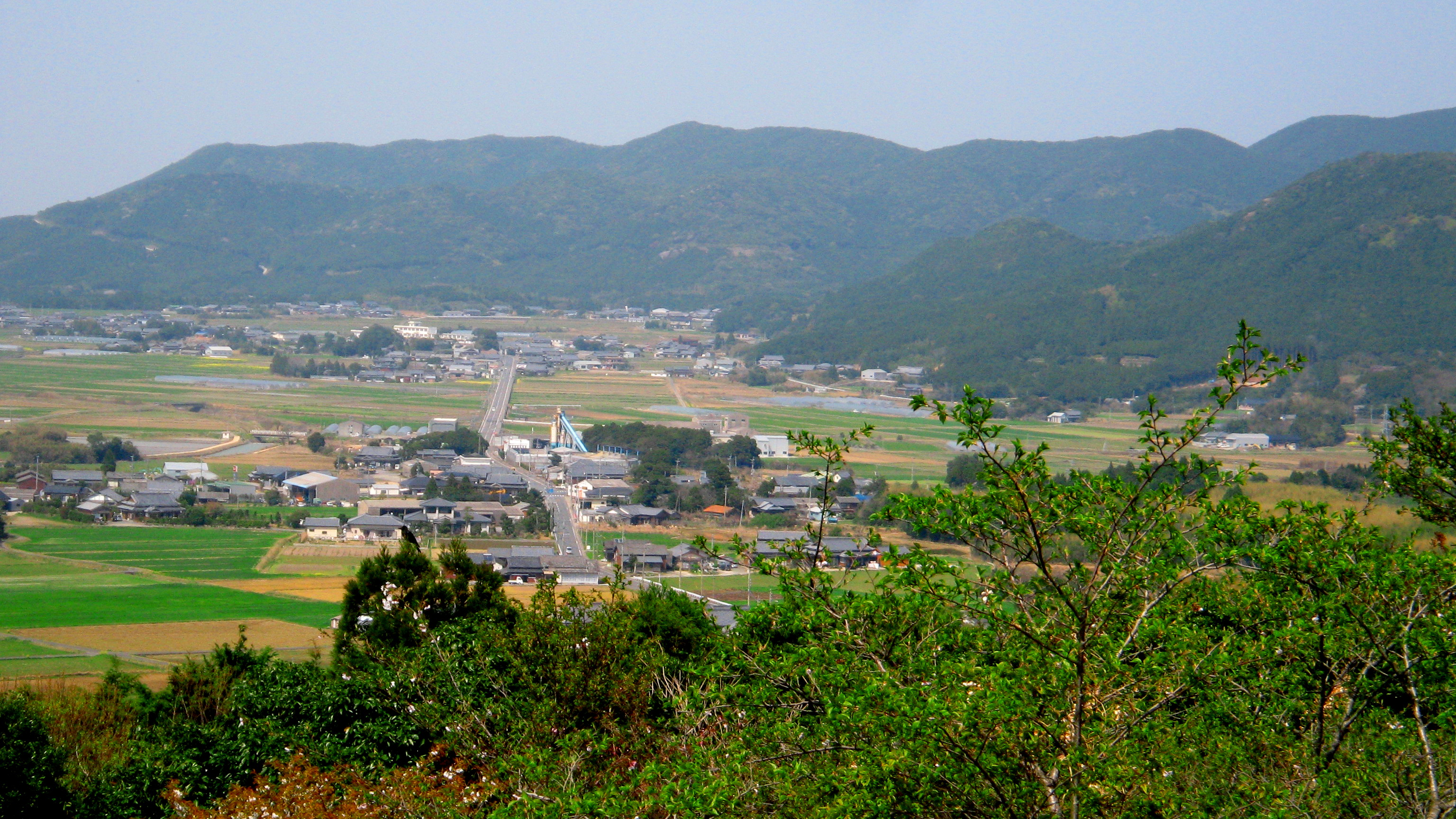 五島列島岐宿町二本楠金比羅山